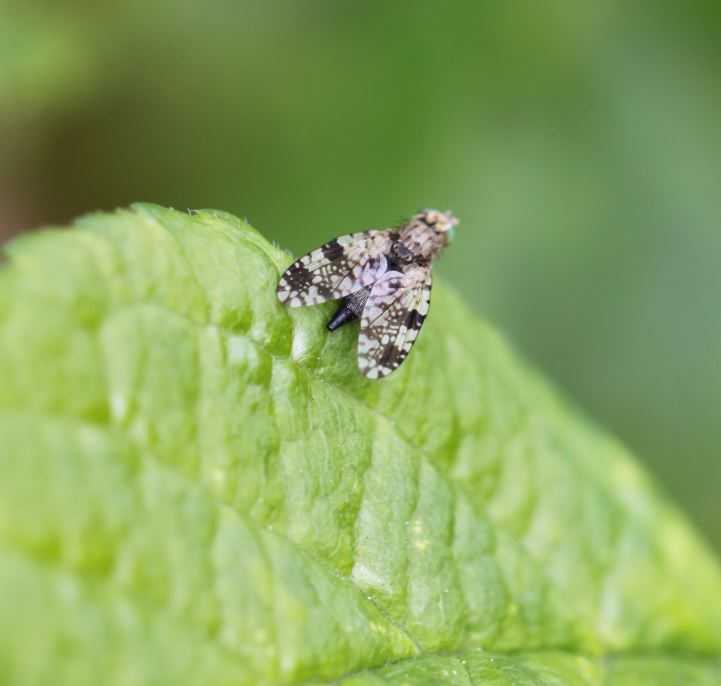 Bohrfliege Tephritis ruralis am 2. Mai 2019 an einem Pflaumenbaum nahe Mannheim